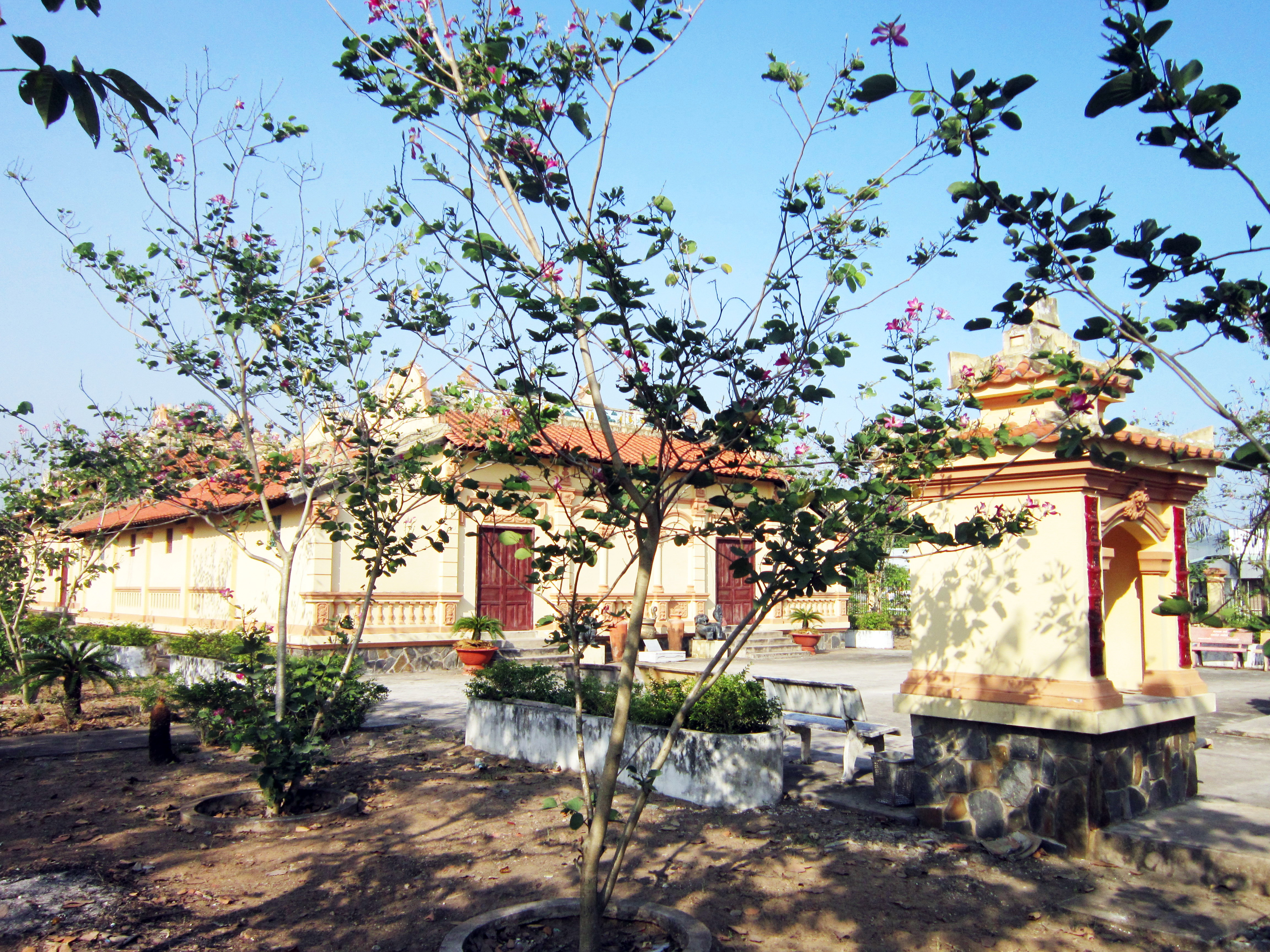 Đình Tân Hoa ở ấp Tân Hưng, xã Tân Hòa, thành phố Vĩnh Long, tỉnh Vĩnh long. Đây là di tích "lịch sử-văn hóa" cấp quốc gia Việt Nam.